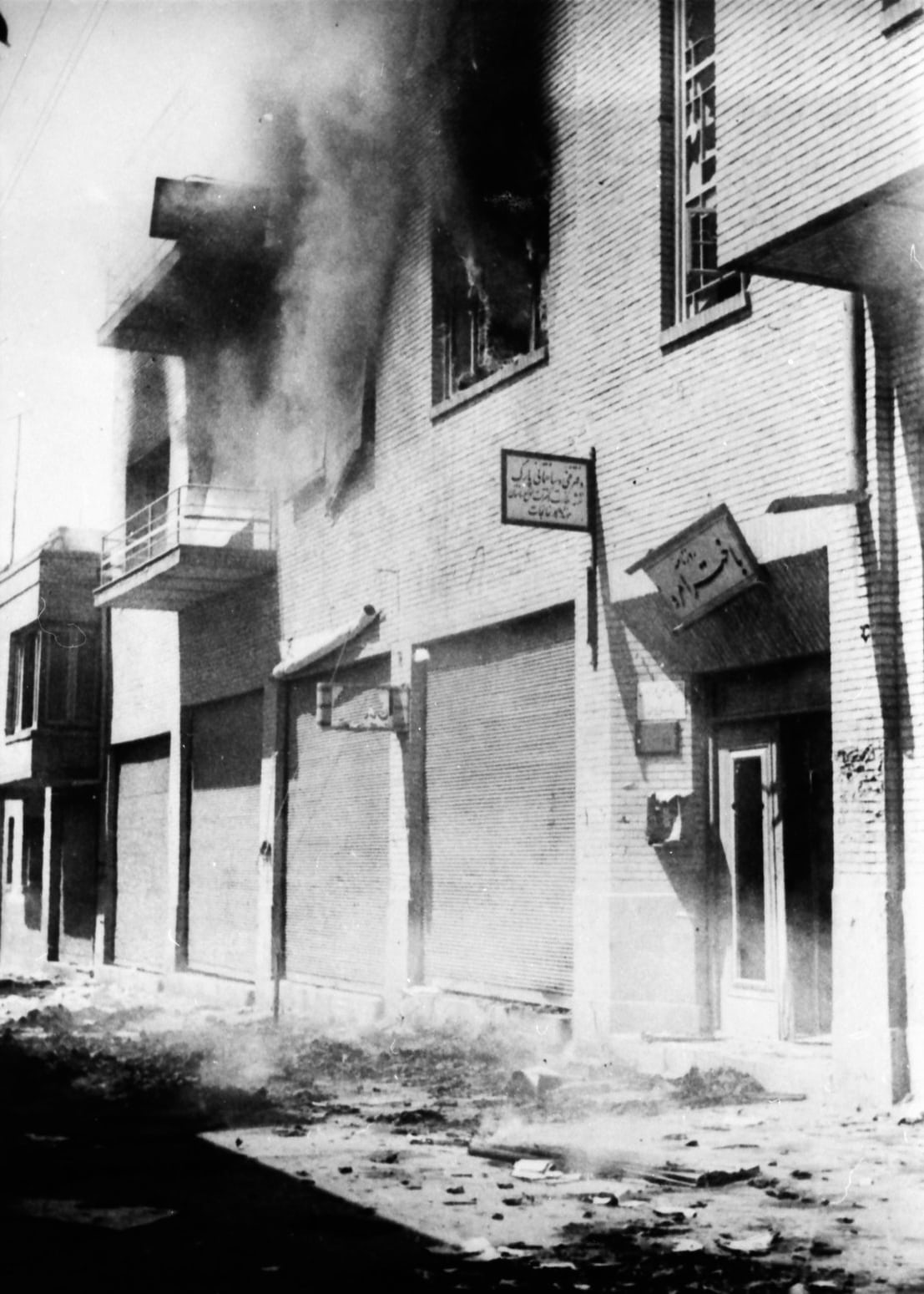 28 مرداد 1332، 10 صبح: آتش زدن ساختمان‌های روزنامه‌های طرفدار دولت - این نگاره مربوط به دفتر روزنامه بختیار متعلق به دکتر حسین فاطمی است.